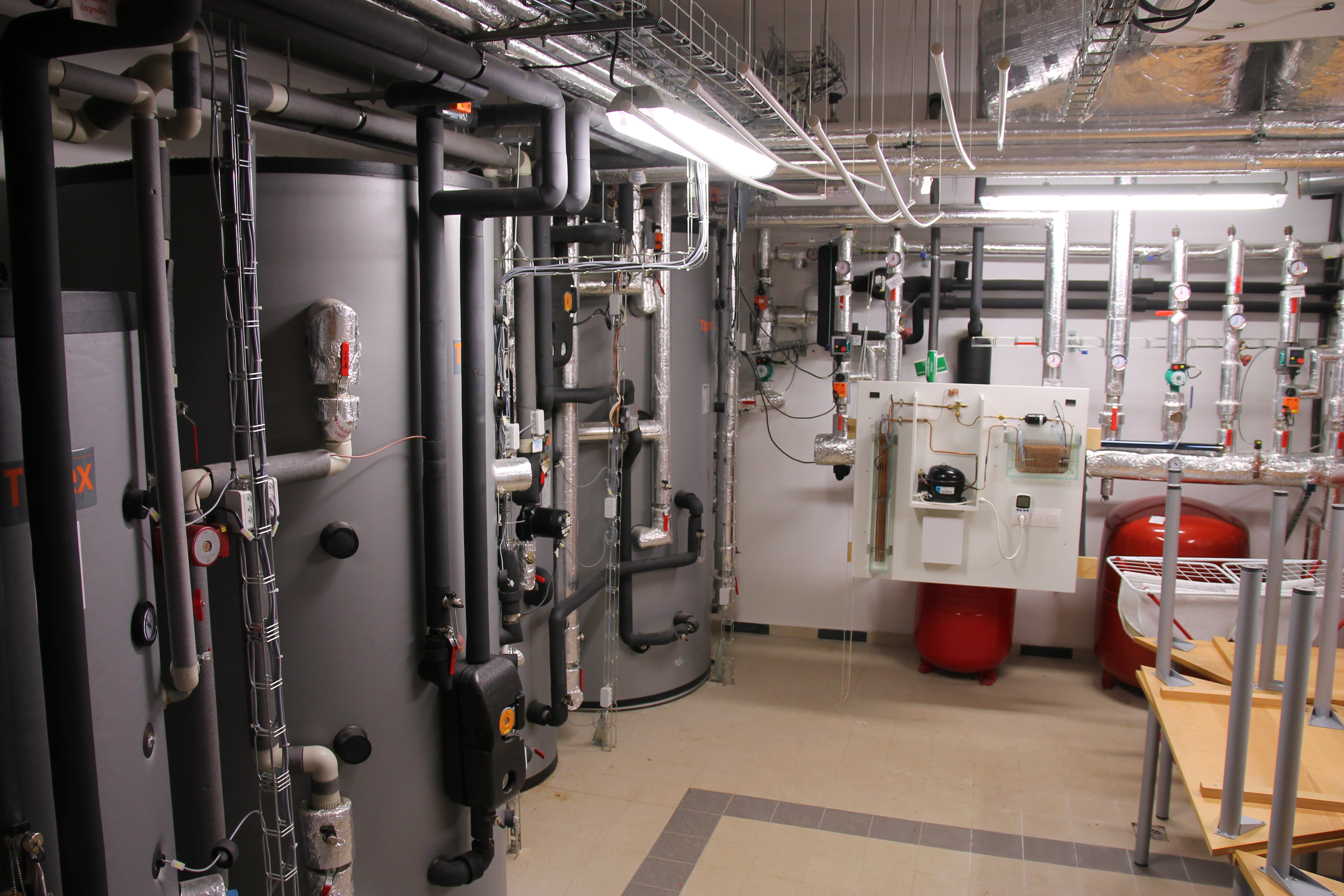 Kotelna skautské základny Kaprálův mlýn, Ochoz u Brna